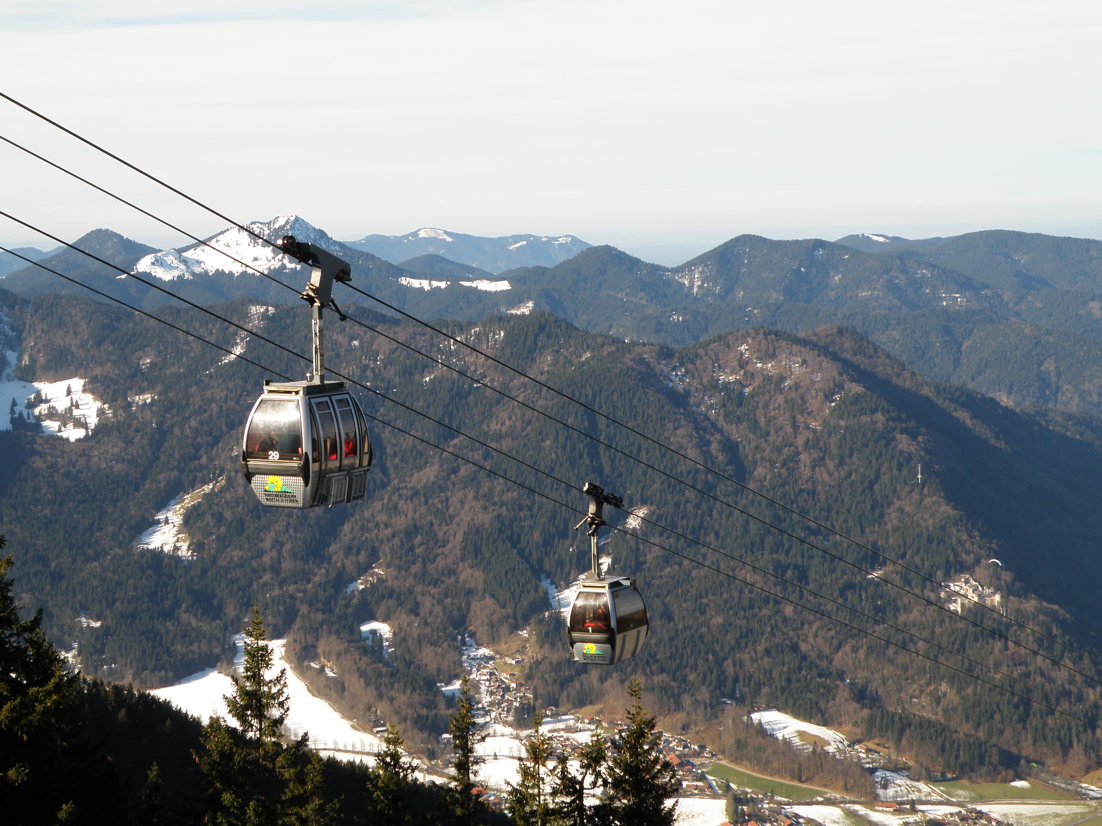 Gondoly lanové dráhy na Wallberg